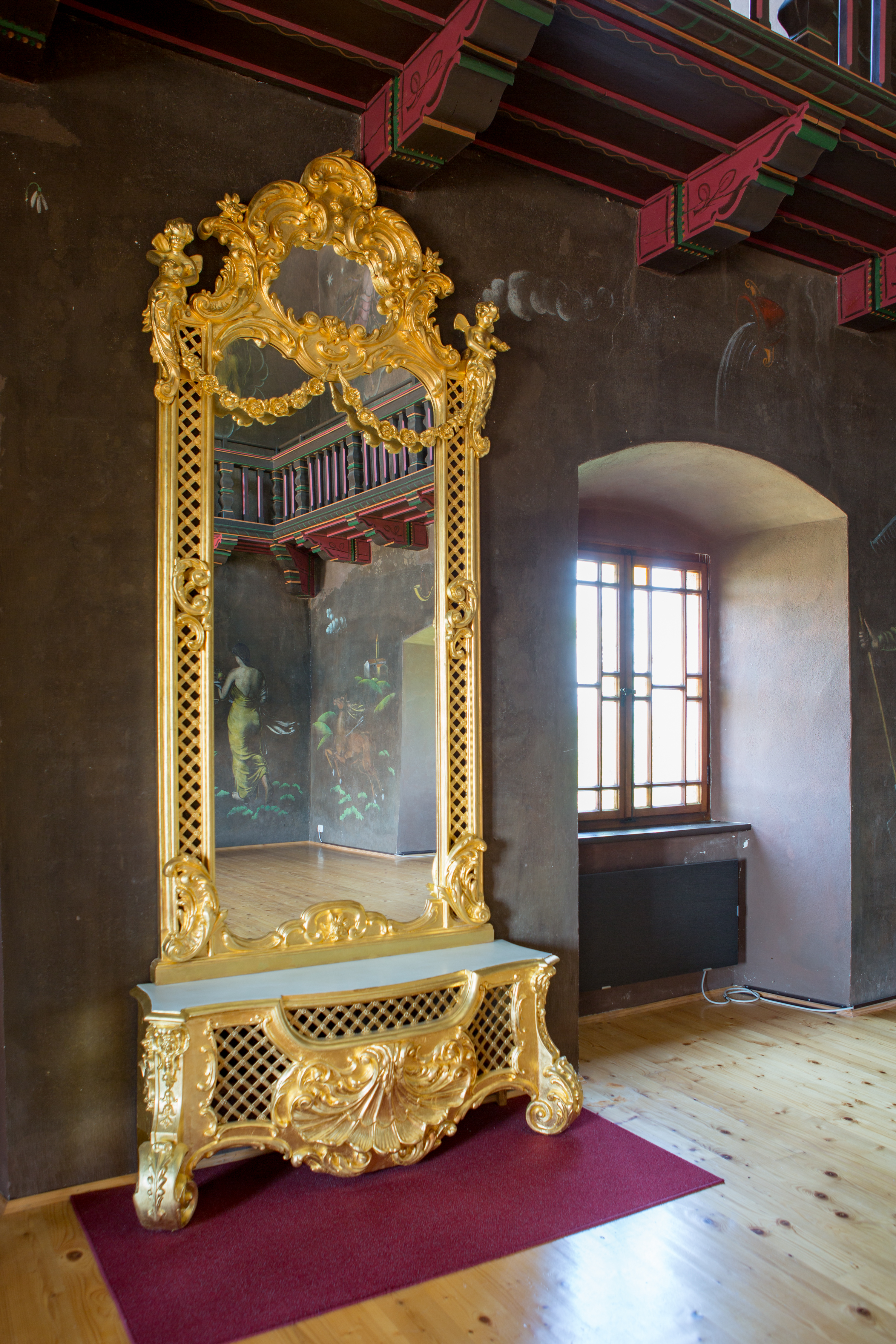 Baročno ogledalo v slavnostni dvorani na gradu Prem, ki jo je poslikal Mario Lannes leta 1932.